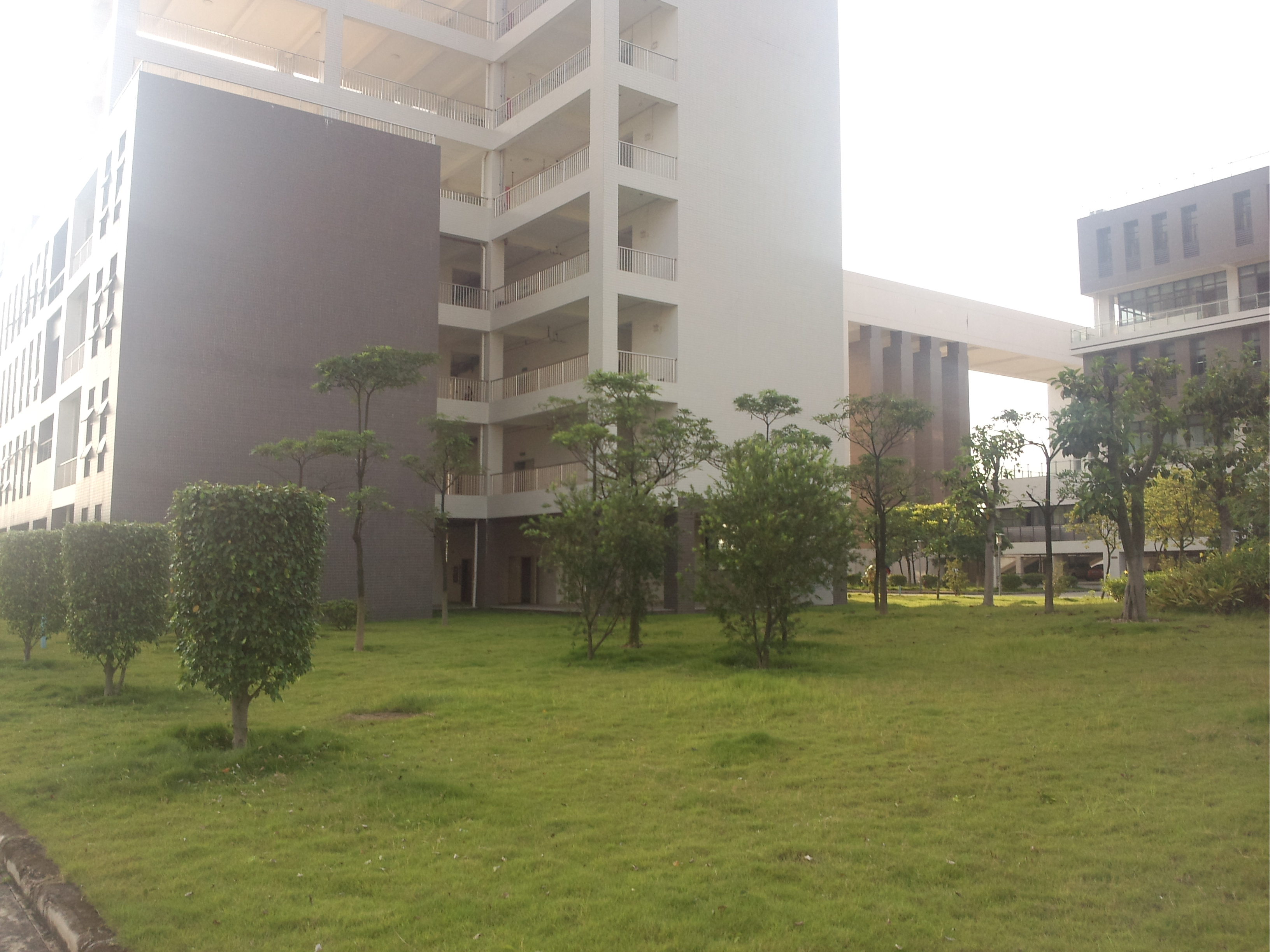 中文（中国大陆）: 摄于广东第二师范学院花都校区